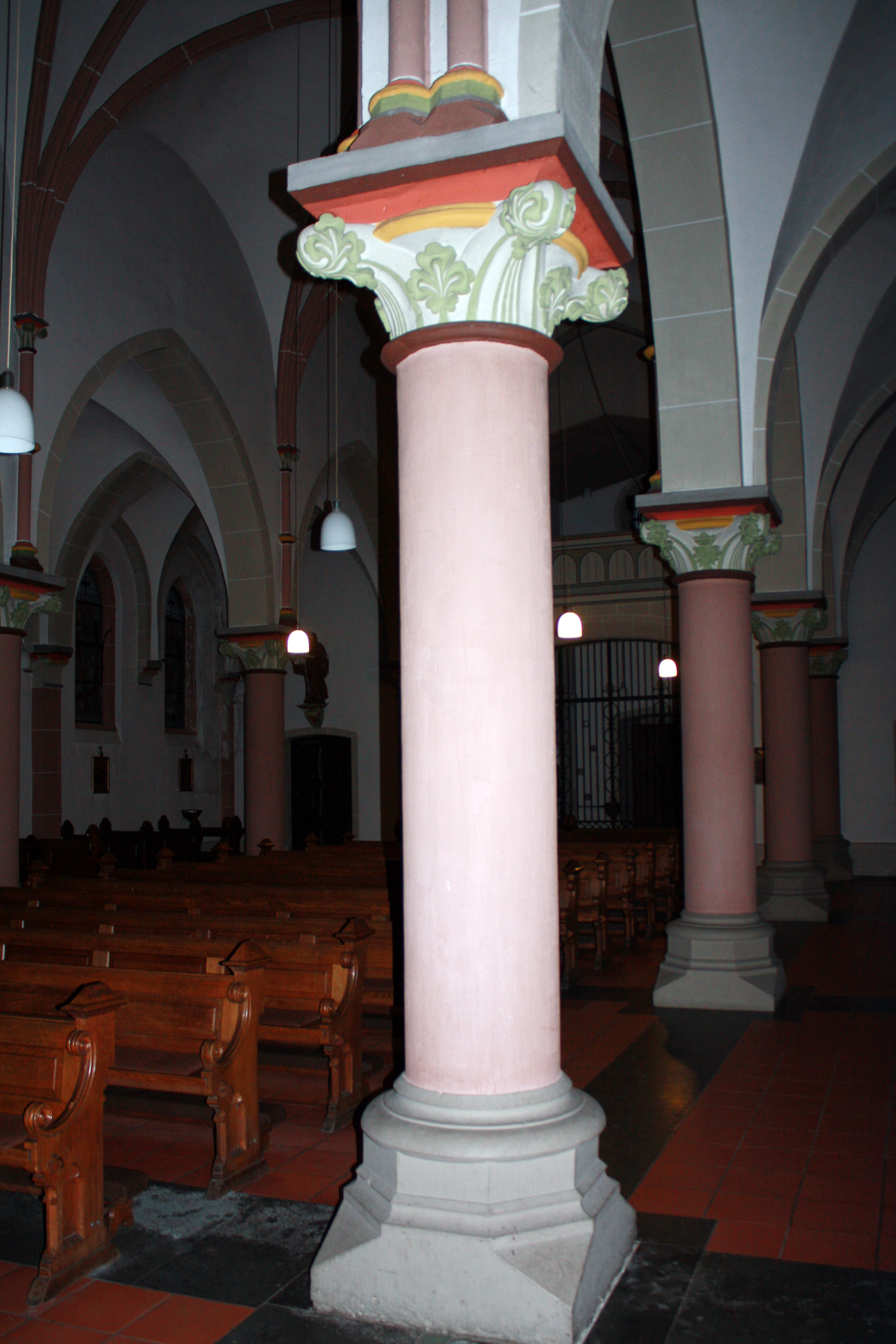 Hürth-Fischenich, St. Martin Kirche. Säulenarchitektur.